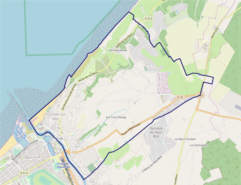 carte réalisée sur umap This map may be incomplete, and may contain errors. Don't rely solely on it for navigation.